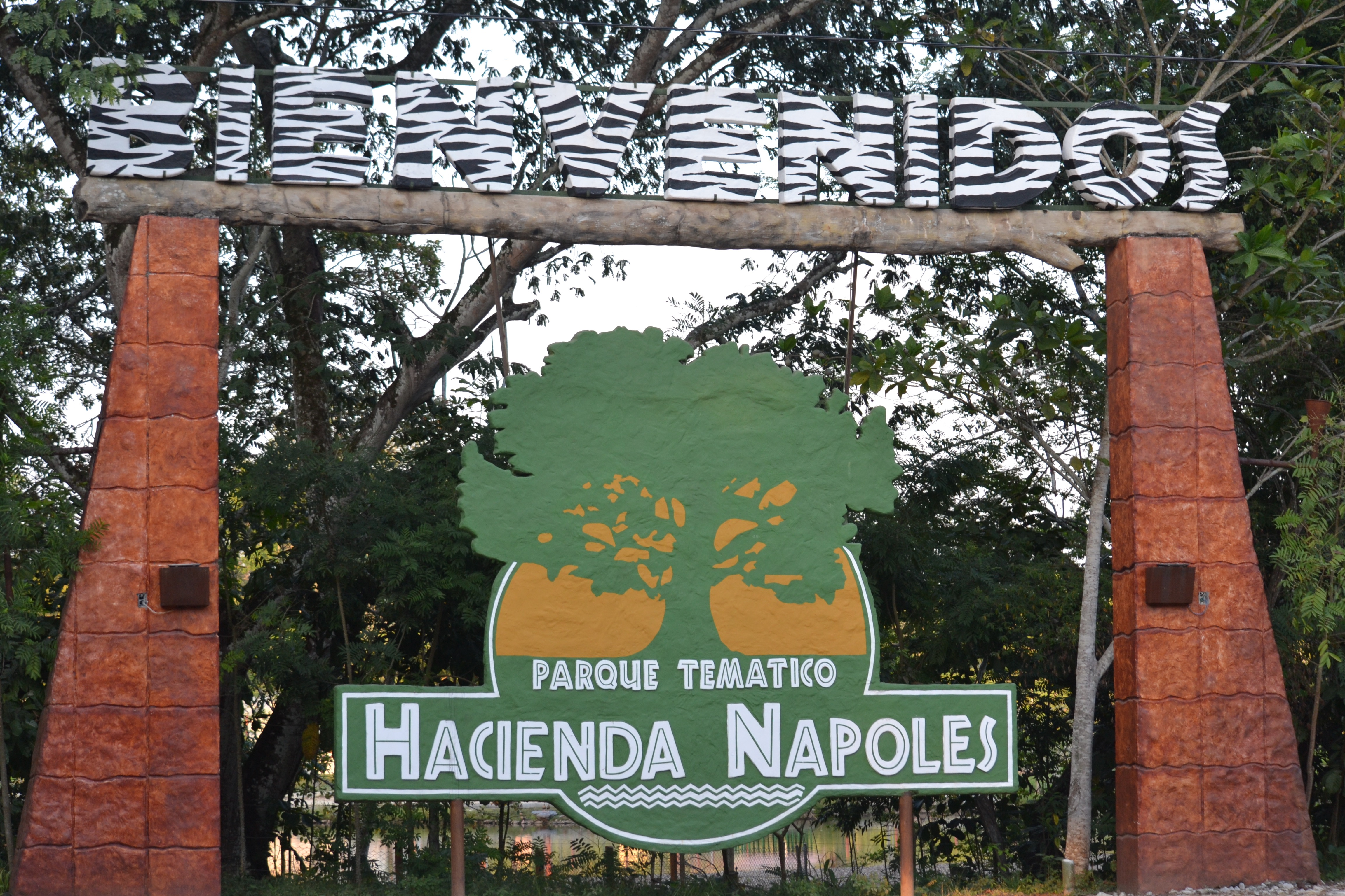 Bienvenida al Parque